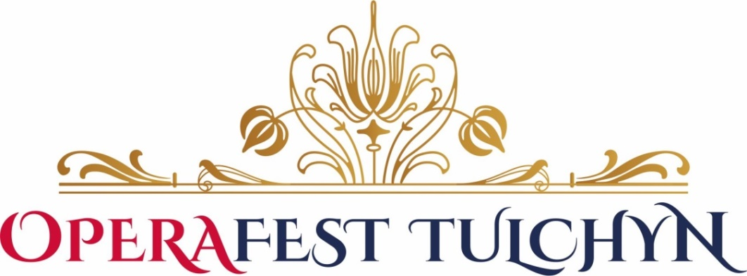 Логотип фестивалю OperaFest у місті Тульчин